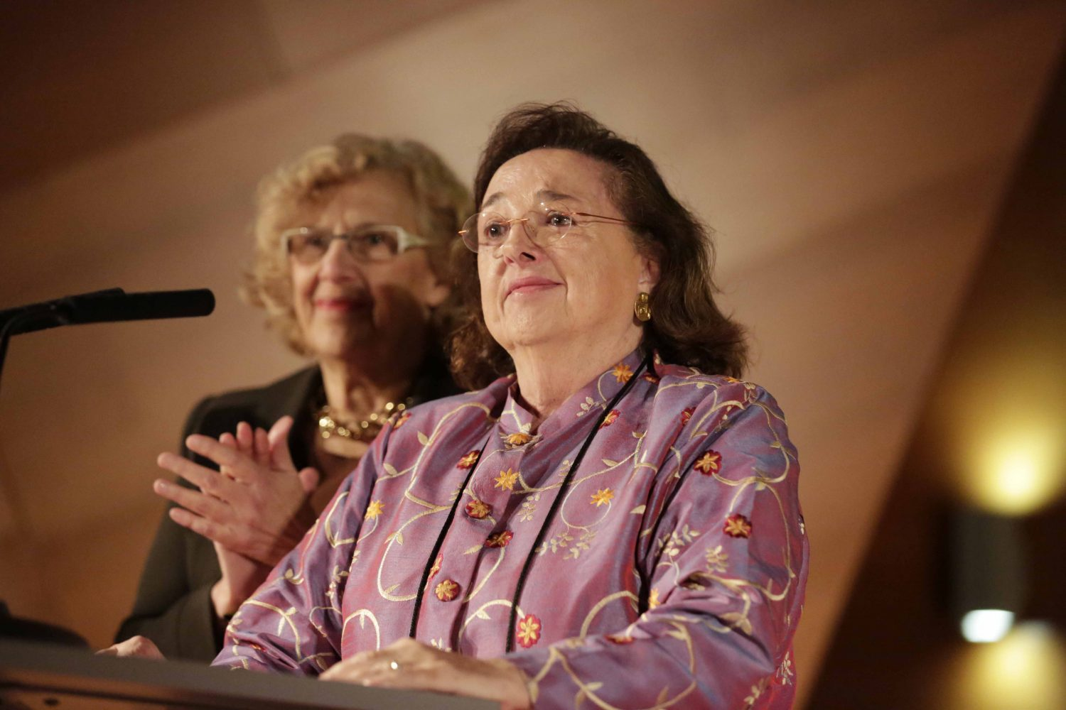 Reivindicar la memoria de las mujeres y, en especial, la de las mujeres de la Generación del 27, olvidadas por la historia de este país, es el tema central de la conmemoración del Día Internacional de la Mujer en el Ayuntamiento de Madrid. Hoy (miércoles, 8 de marzo), en la Caja de Música de CentroCentro y en este marco de visibilizar a estas mujeres importantes para el mundo de la cultura de nuestro país y para la ciudad de Madrid, la alcaldesa de Madrid, Manuela Carmena, ha entregado el Premio Honorífico “Clara Campoamor” a la periodista y activista feminista Carmen Sarmiento, una luchadora por los derechos de las mujeres durante toda su trayectoria personal y profesional.